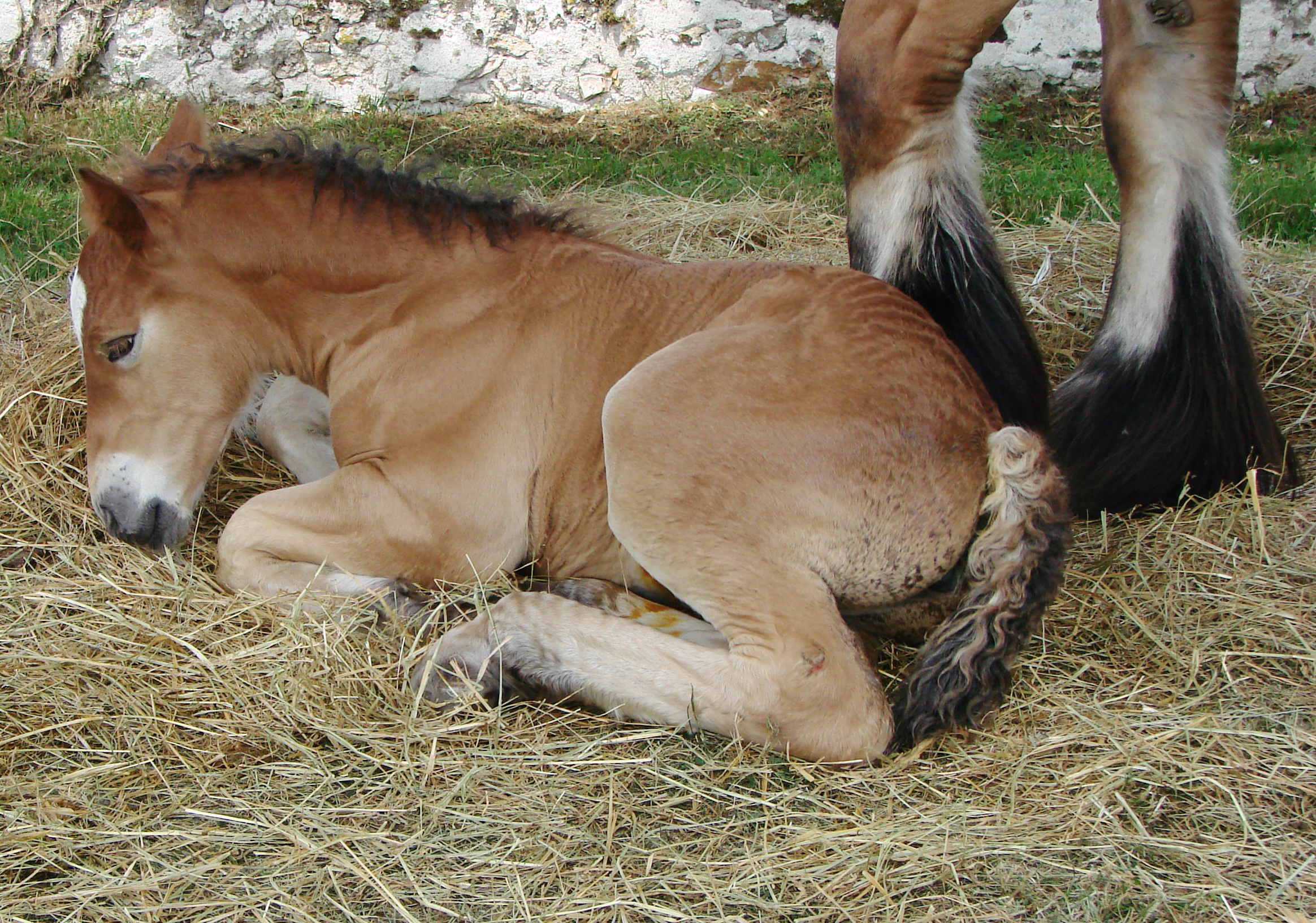 Très jeune poulain de race ardennaise, couché près de sa mère.(Le désinfectant sous le ventre reçu à la naissance est encore visible.)